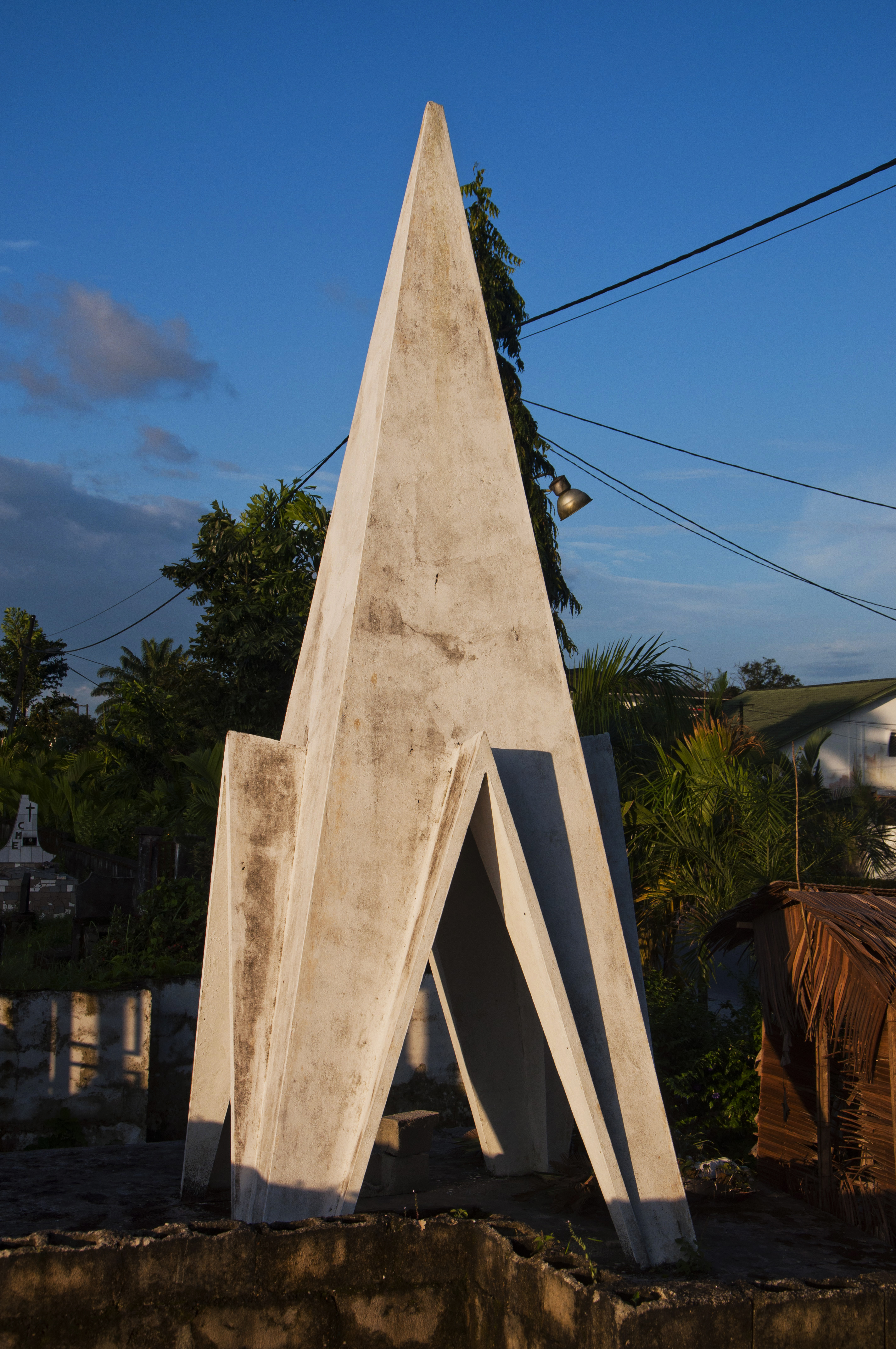 Mausolée de Din Ngosso Bonapriso, Douala